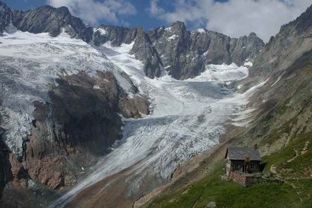 Chelenalp